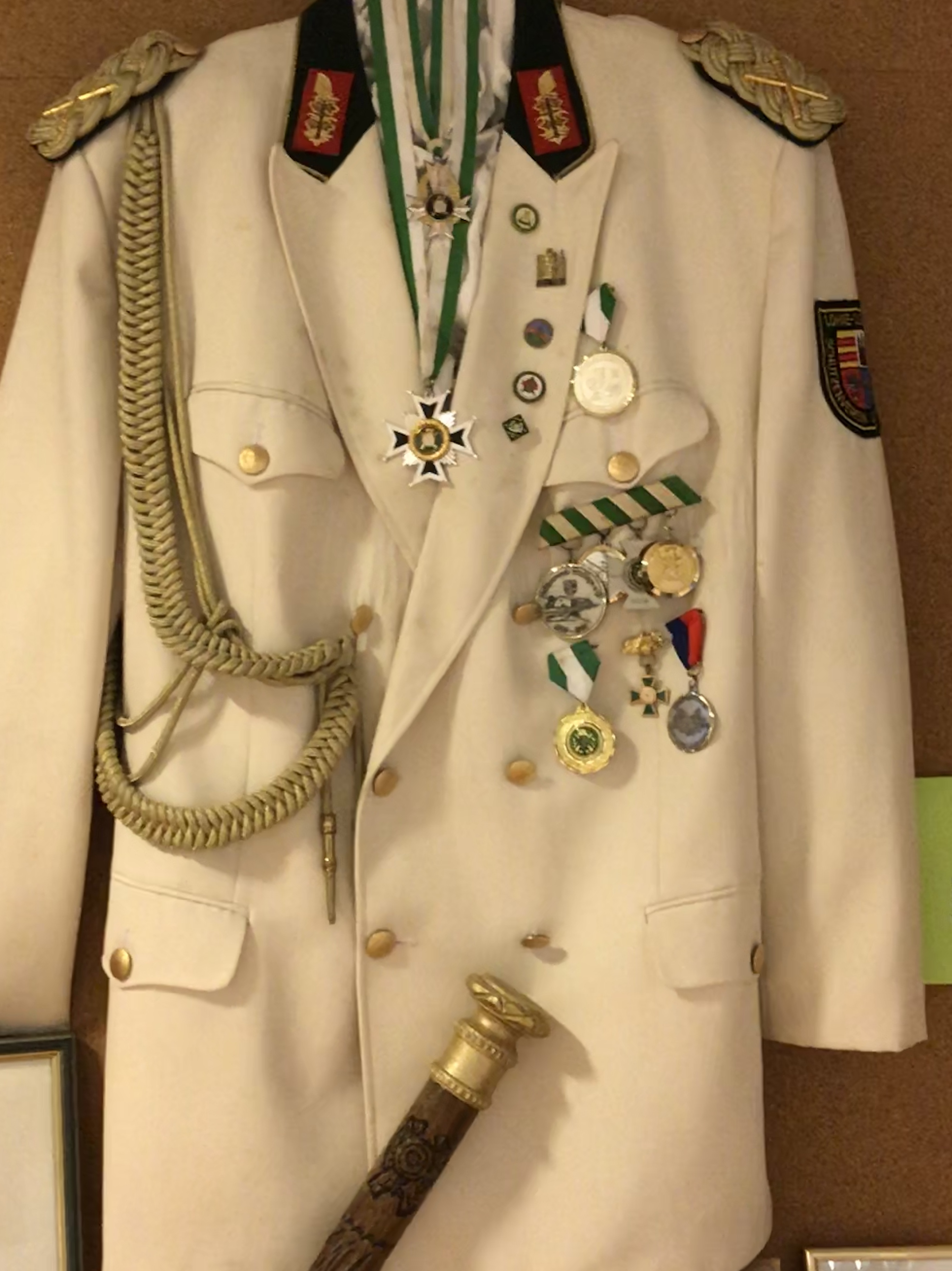 Schützenjacke des Generalfeldmarschals im Lohner Schützenverein